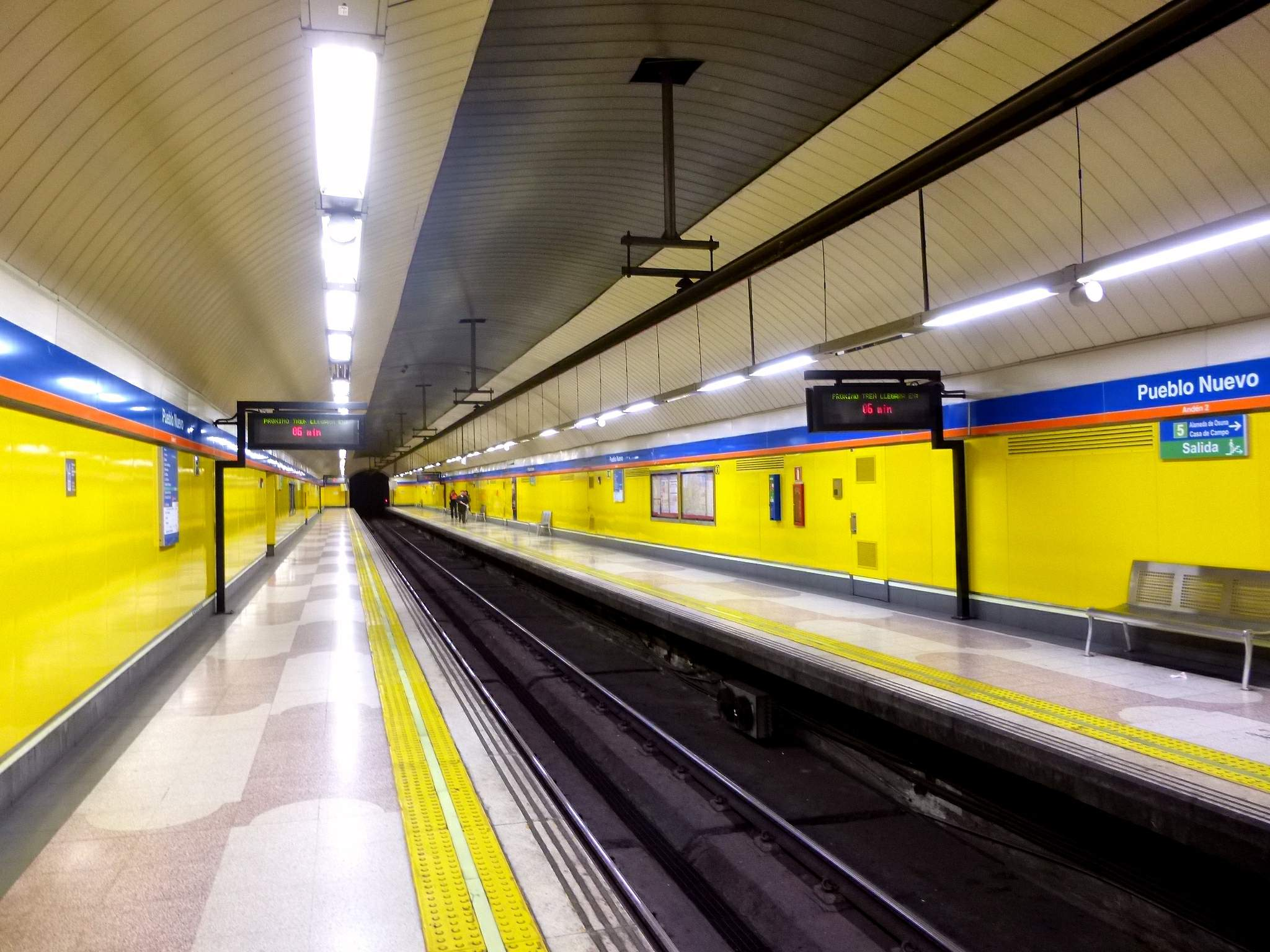 Estación de Pueblo Nuevo, del Metro de Madrid